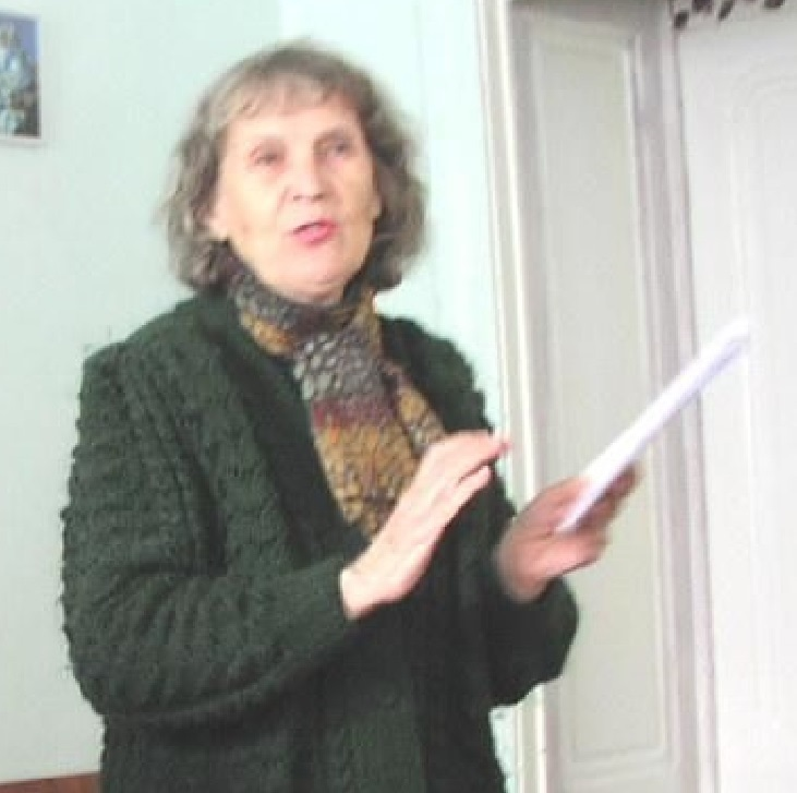 Украинская ученая, философ, профессор, доктор наук, Одесса